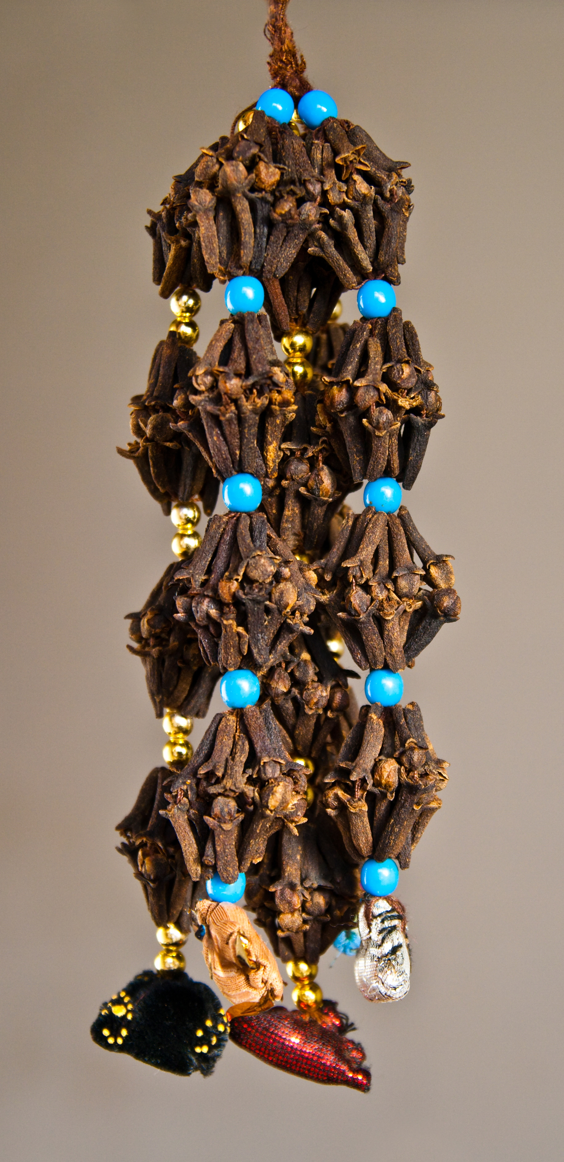 Kurdî: گوڵی وشک کراوی مێخەک